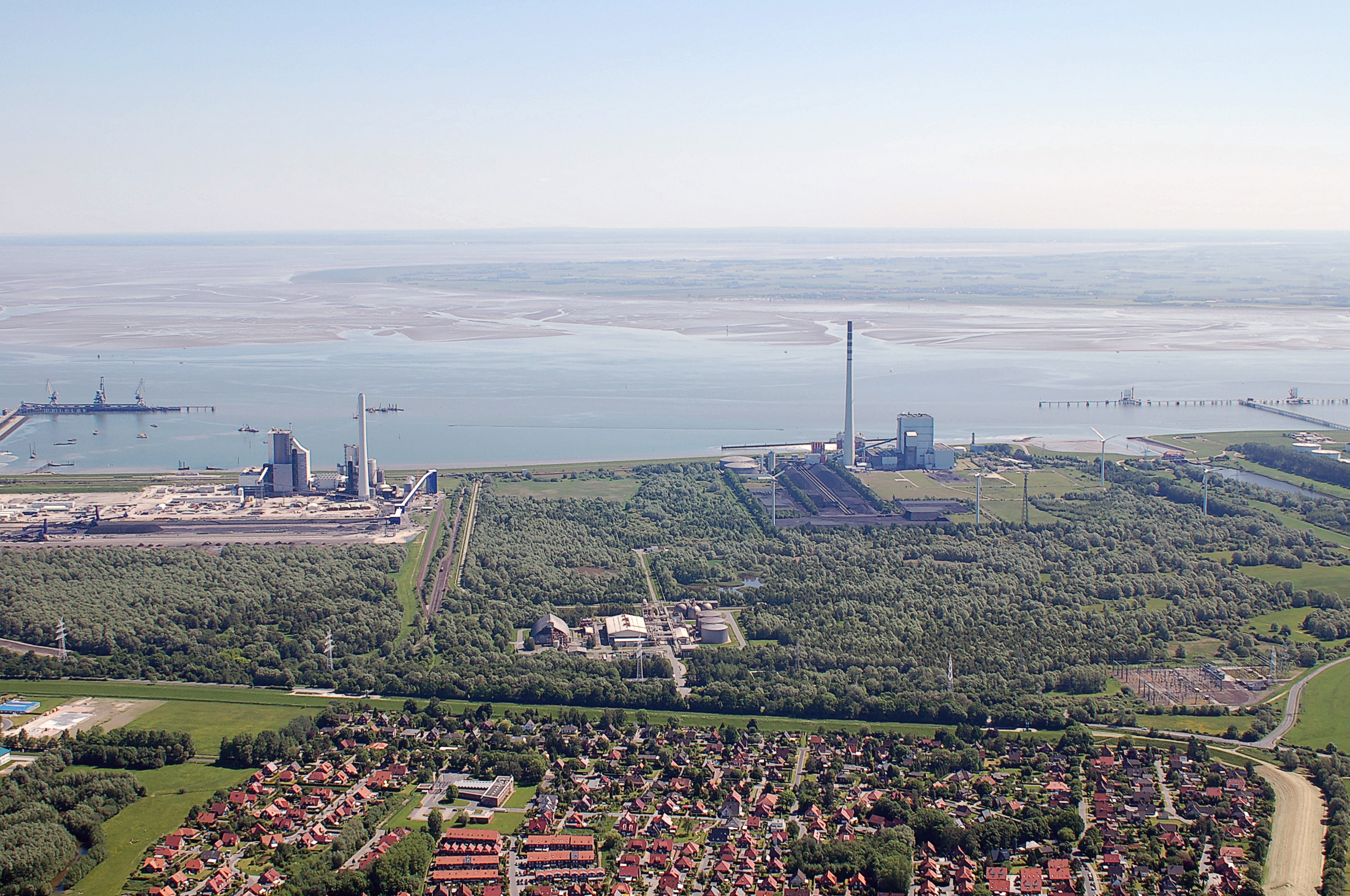 Luftbilder von der Nordseeküste 2012-05